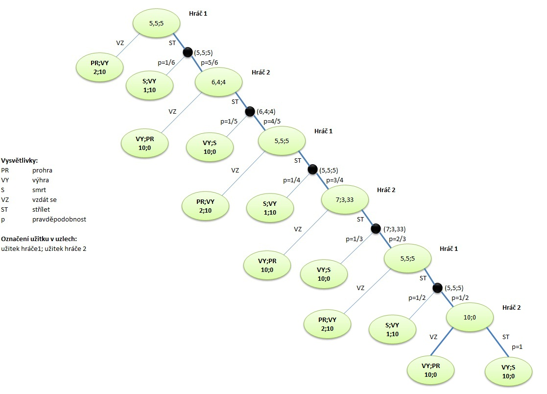 Rozšířená forma hry - hra Ruská ruleta Modifikace příkladu z publikace: DLOUHÝ, Martin; FIALA, Petr. Úvod do teorie her. 2.přepracované vydání. Vysoká škola ekonomická v Praze : Nakladatelství Oeconomica, 2009. 120 s. ISBN 978-80-245-1609-7.